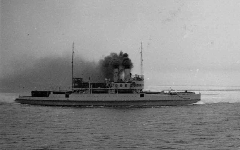 Das Eisenbahnfährschiff Mecklenburg